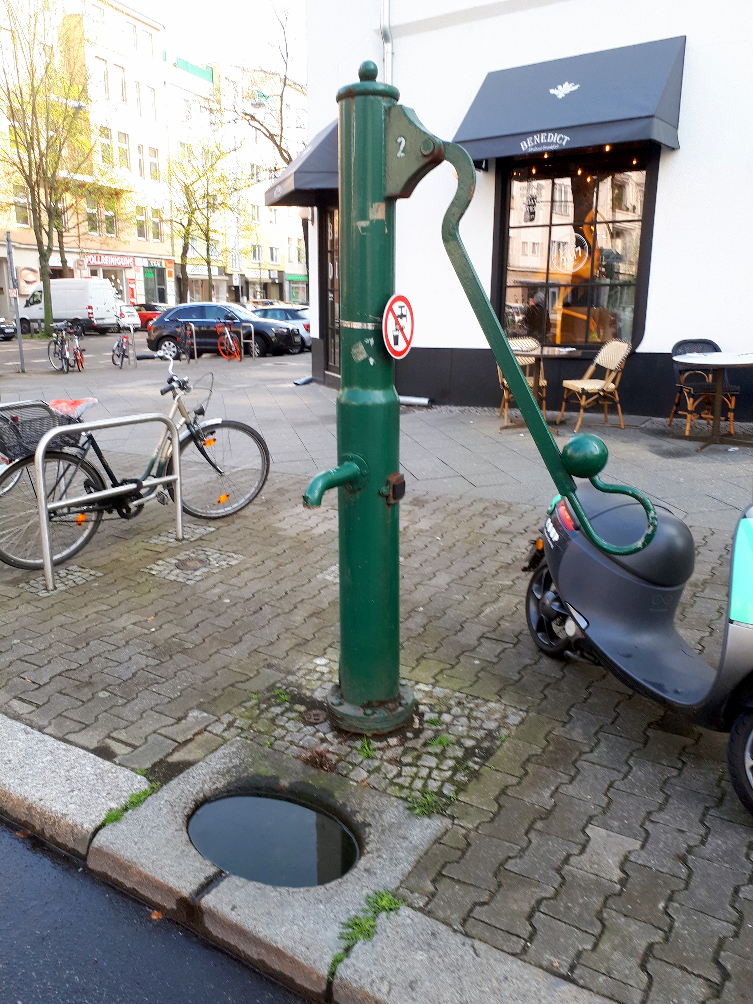 Wilmersdorf Pariser Straße Wasserpumpe #2